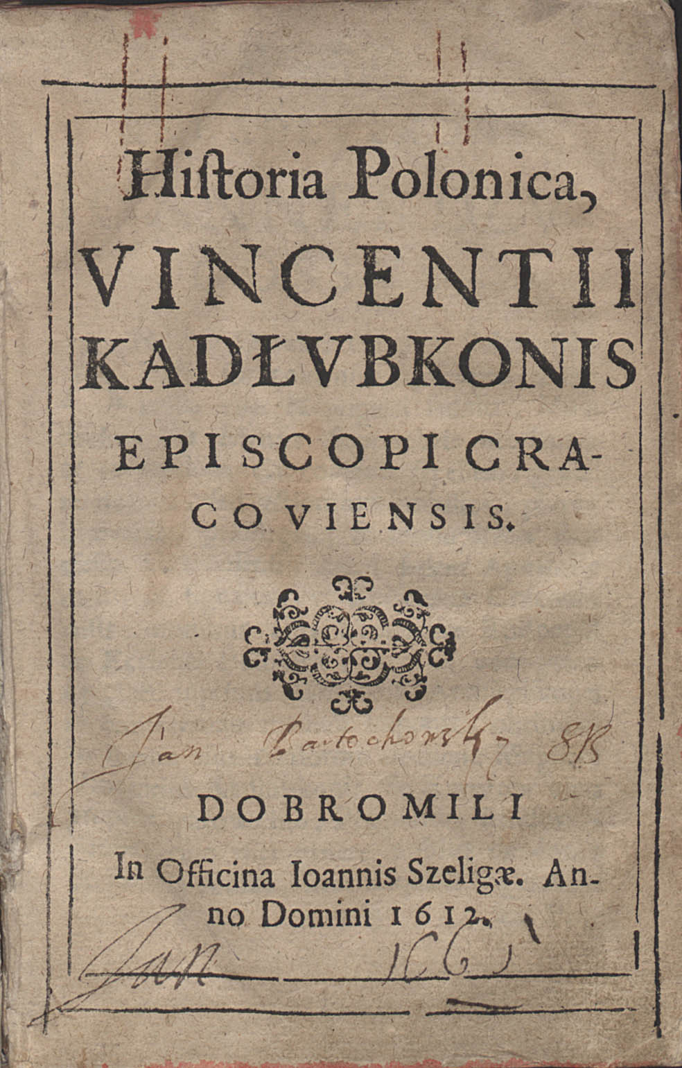 Pierwsza strona wydania książki: "Historia Polski" biskupa krakowskiego Wincentego Kadłubka (oryg. łac. Historia Polonica, Vincenti Kadłubkonis Episcopi Cracoviensis) z 1612 r.